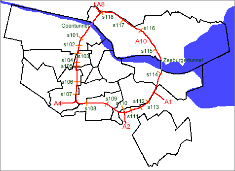 Ringweg A10 Amsterdam met afritten S-wegen. Eigen werk, vrij te gebruiken.